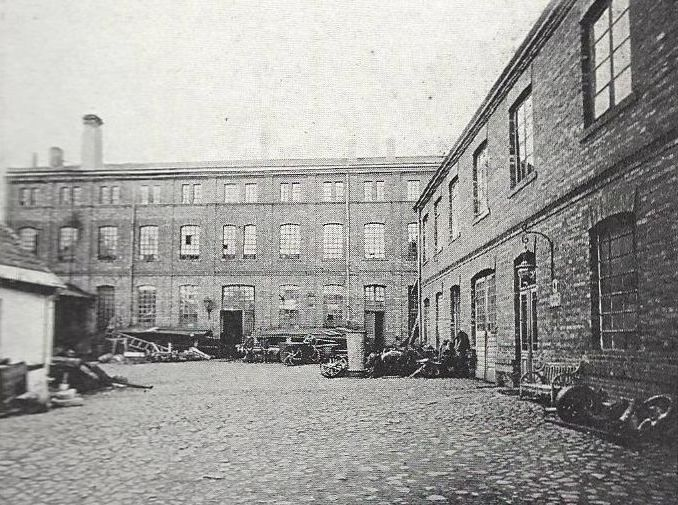 Budynki fabryki C. Skoryna i Sp. Fabryka kamieni i maszyn młyńskich przy ul. Olszowej 14 w Warszawie